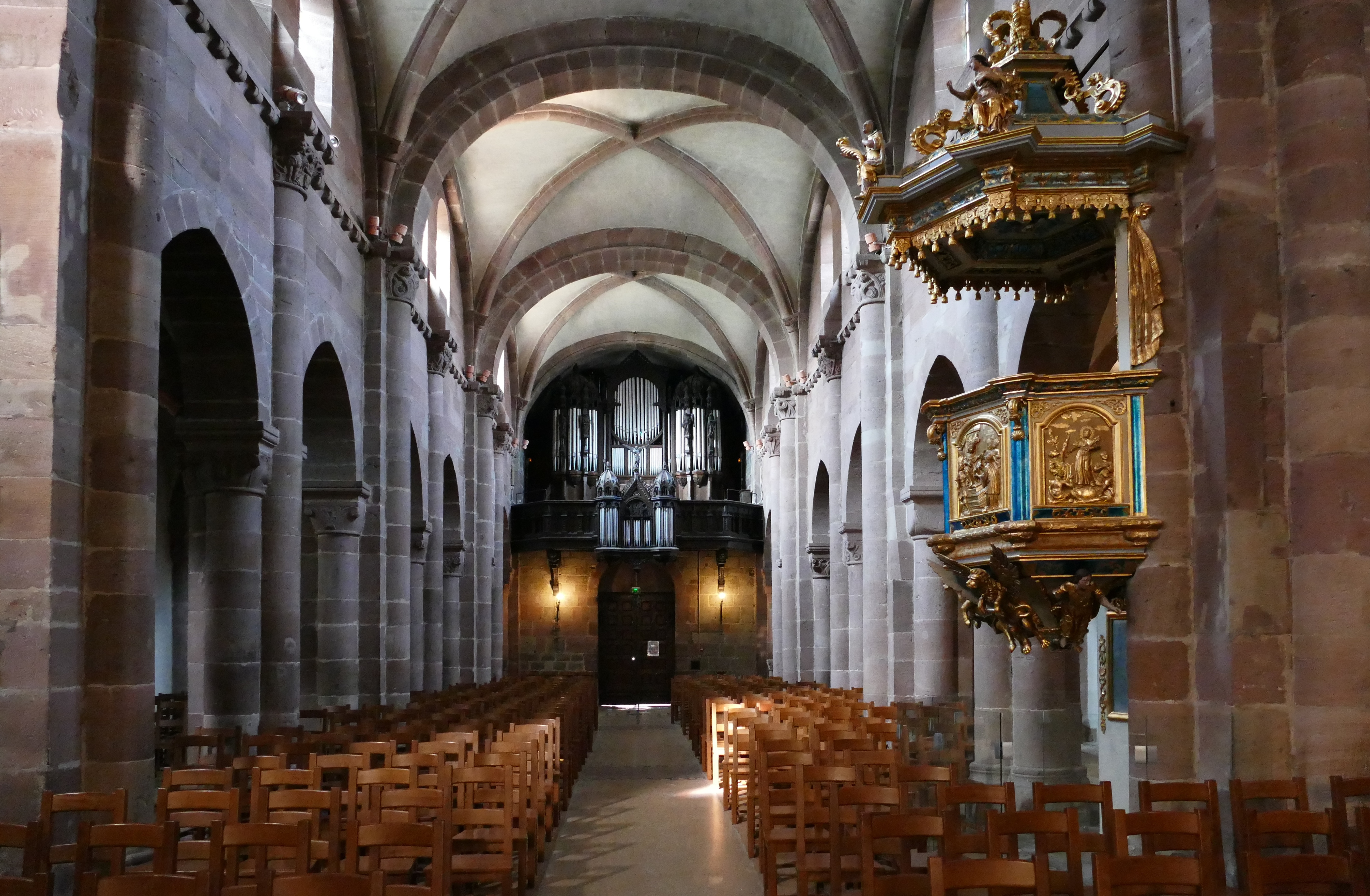 Alsace, Bas-Rhin, Sélestat, Église Sainte-Foy (PA00084981, IA00124586): Vue intérieure de la nef vers le chœur.